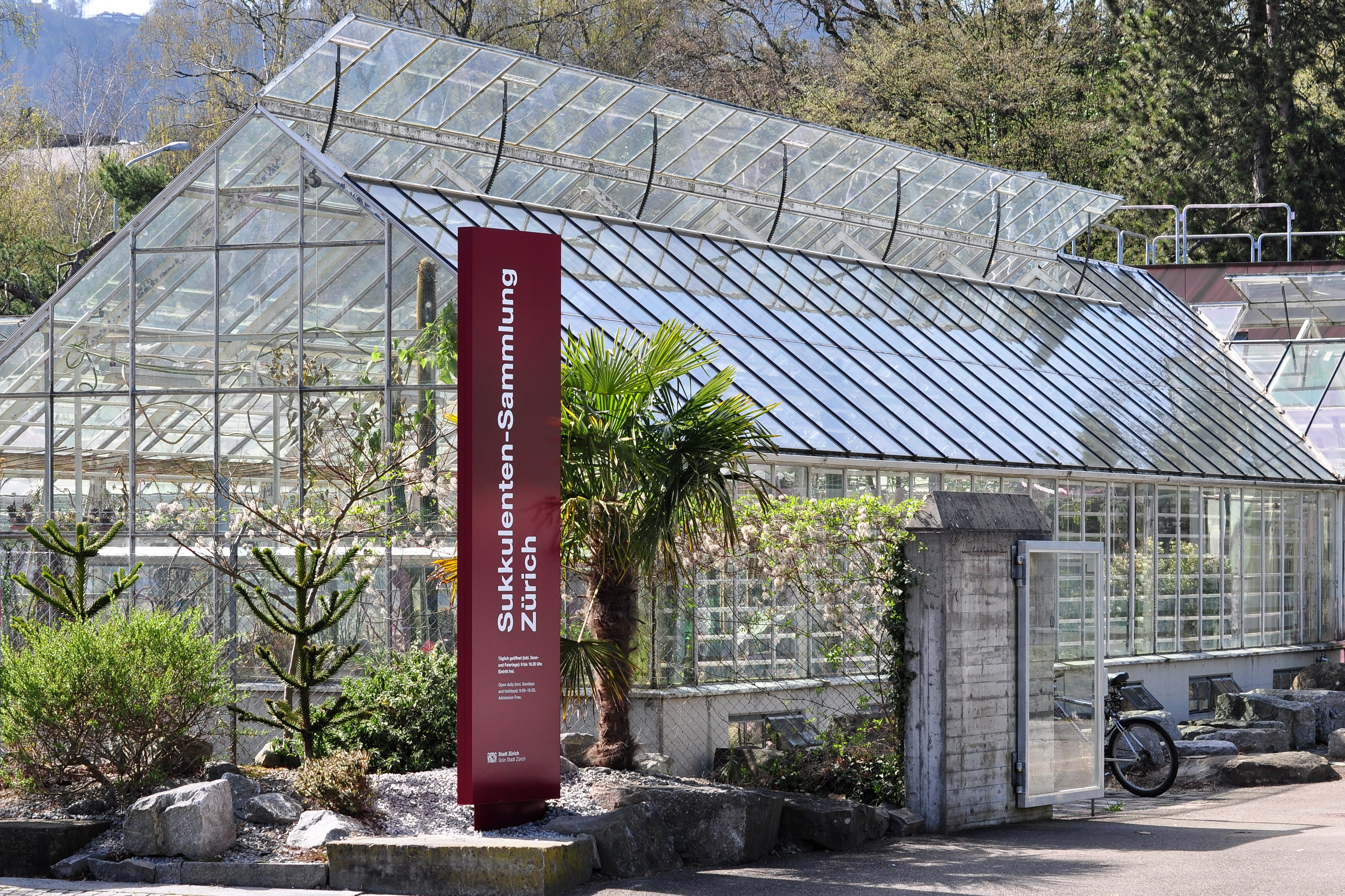 Sukkulentensammlung in Zürich (Switzerland)